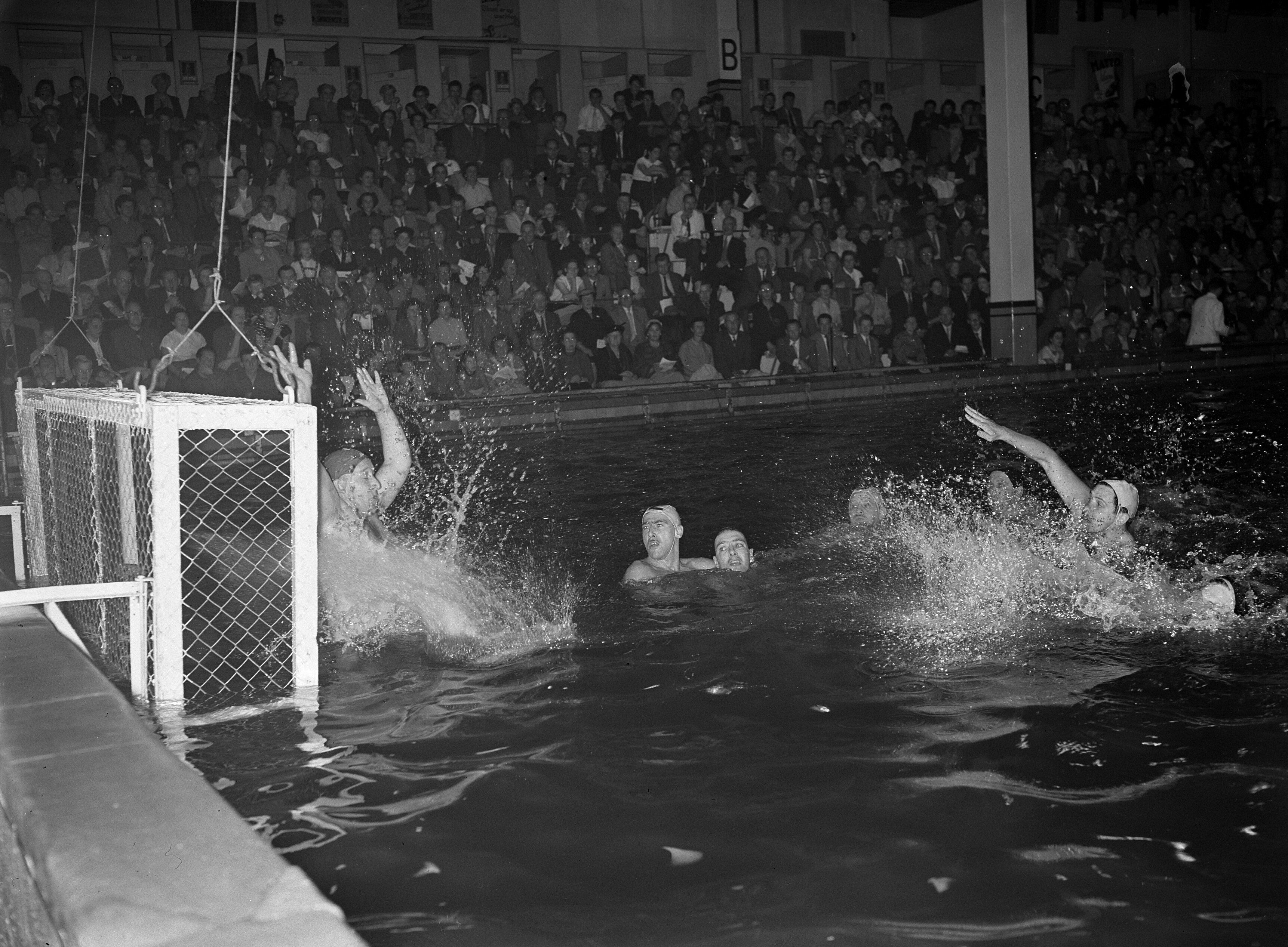 Collectie / Archief : Fotocollectie Anefo Reportage / Serie : [ onbekend ] Beschrijving : Zwemfeest sportfondsenbad Amsterdam waterpolo Meeuwen tegen BSC Datum : 9 oktober 1954 Locatie : Amsterdam, Noord-Holland Trefwoorden : WATERPOLO Persoonsnaam : MEEUWEN Fotograaf : Rossem, Wim van / Anefo Auteursrechthebbende : Nationaal Archief Materiaalsoort : Glasnegatief Nummer archiefinventaris : bekijk toegang 2.24.01.09 Bestanddeelnummer : 906-7738